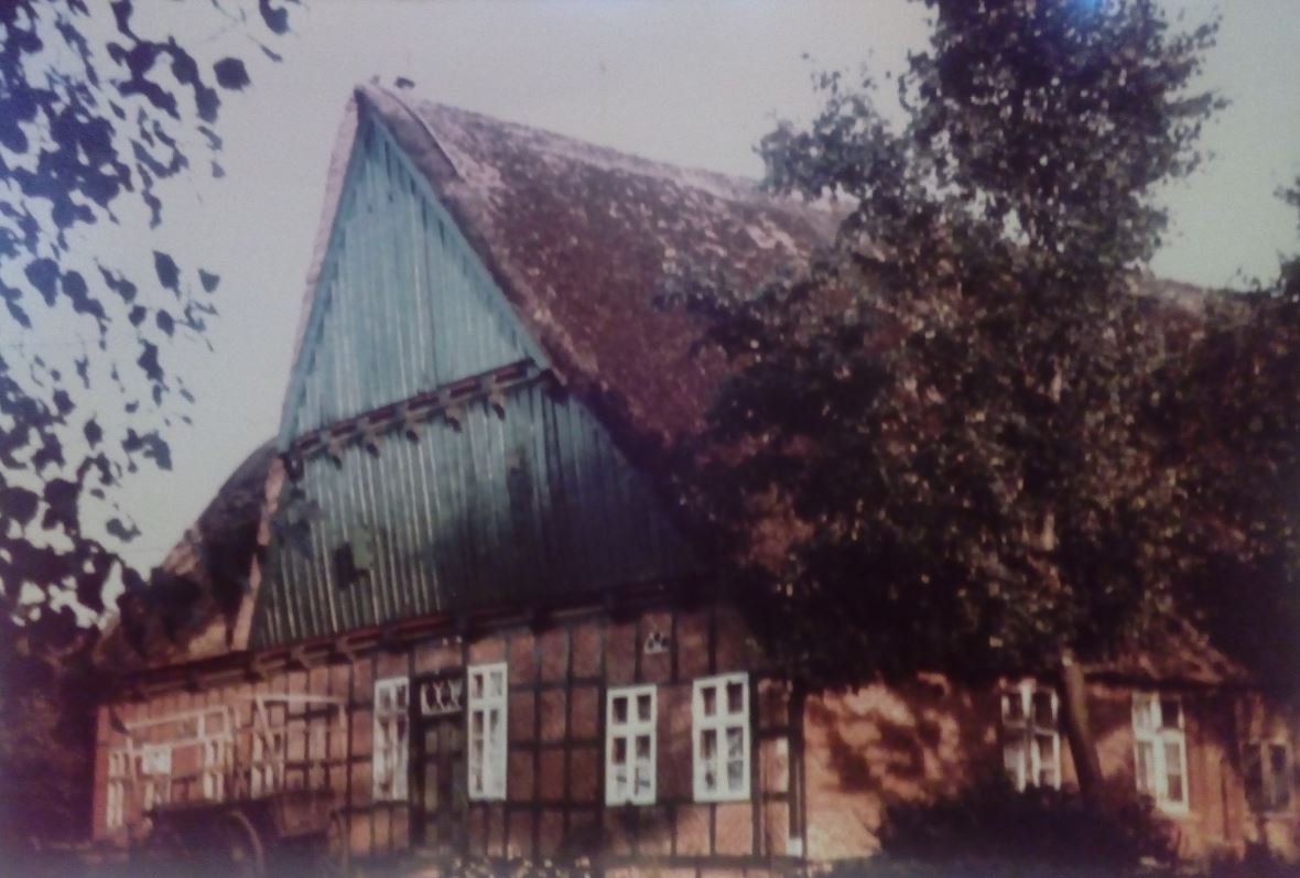 einziges Farbbild des Hofes,um 1974